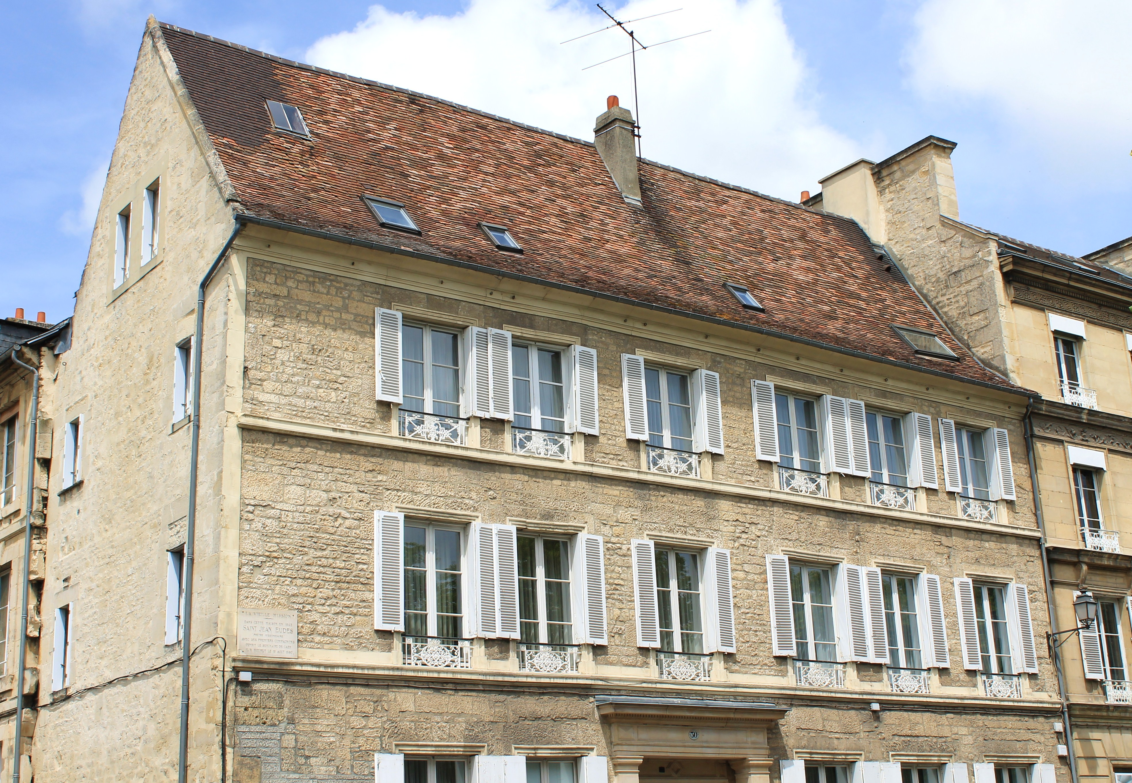 En 1643, dans cette maison au 30 rue Jean Eudes à Caen saint Jean Eudes "prêtre missionnaire" avec ses compagnons ouvrit le séminaire des Eudistes de Caen. Il y mourut le 19 août 1680.